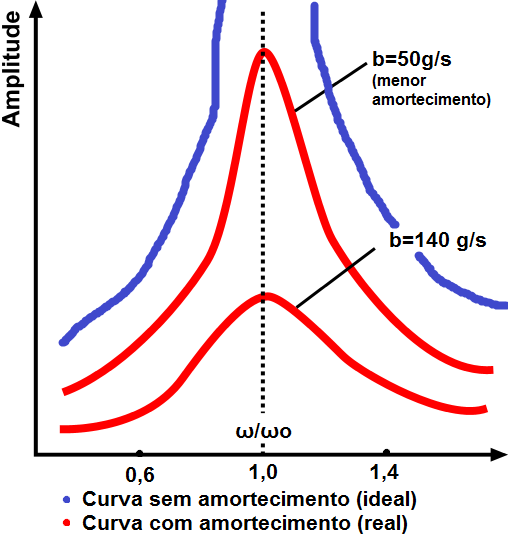 Ressonância